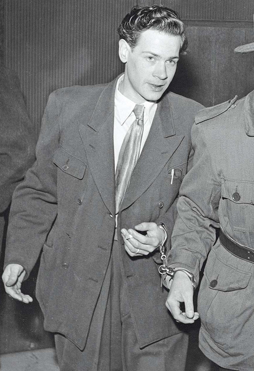 Rolf Eskil Johansson alias "Tumba-Tarzan" förs till häktet i juni 1955.